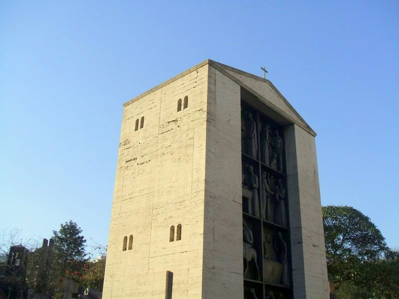 Galileo Emendabili - Túmulo da Família Varam Keutenedjian, Cemitério São Paulo, São Paulo, Brasil